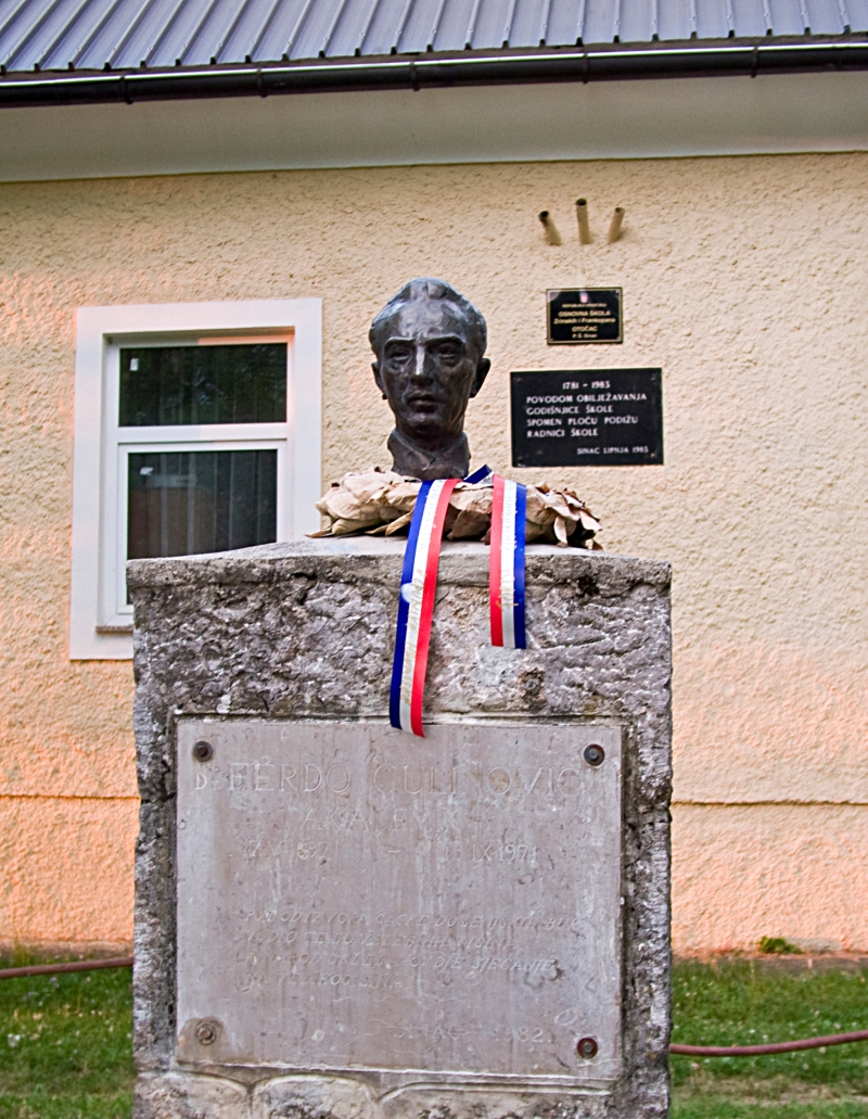 Spomenik Ferdu Čulinoviću u Sincu kod Otočca